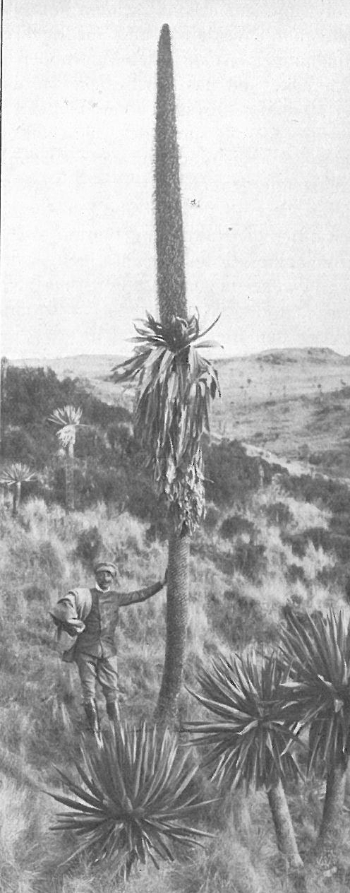 Flora Semien Djibarra-Pflanzen